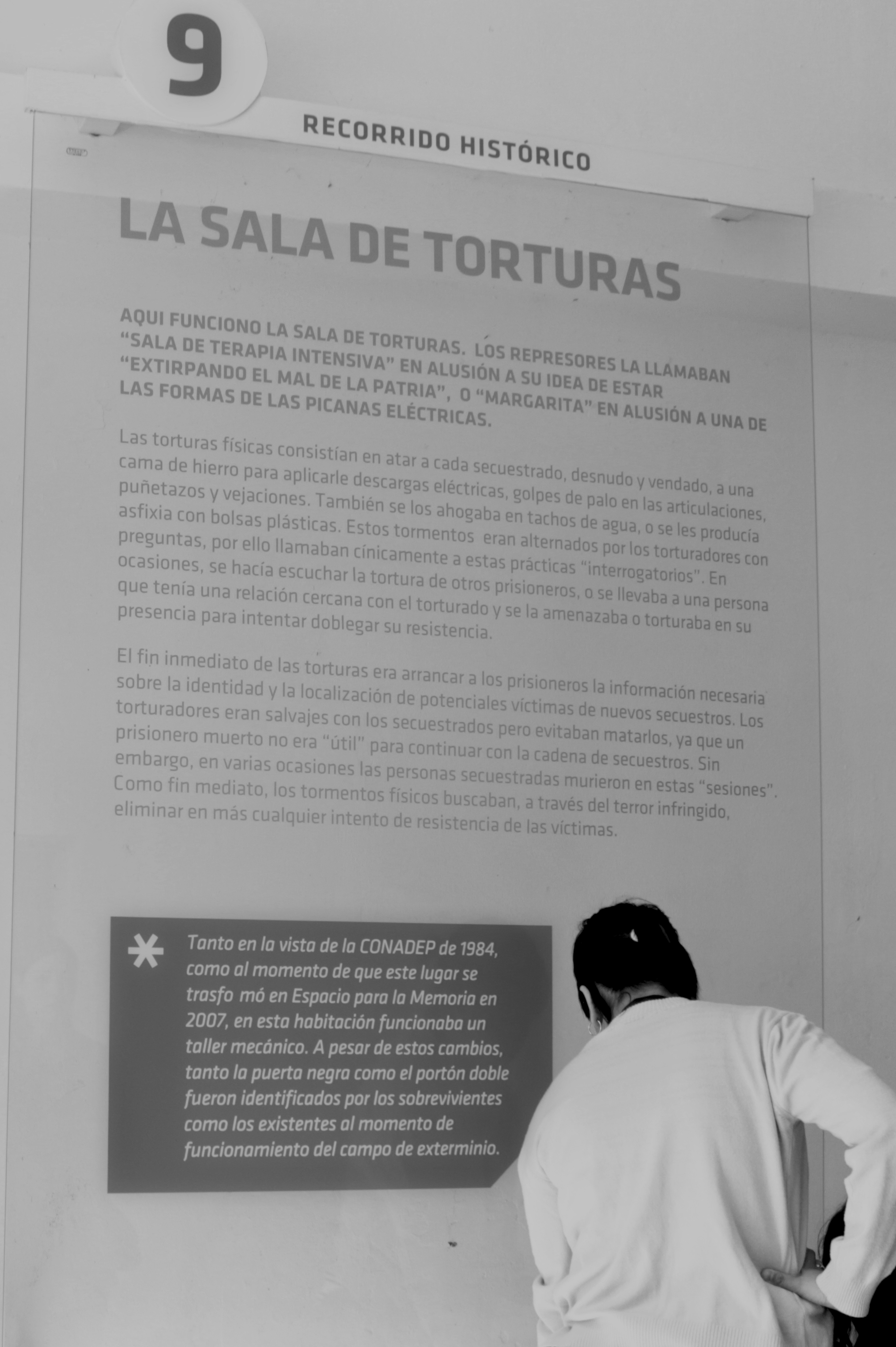 Espacio Para La Memoria La Perla